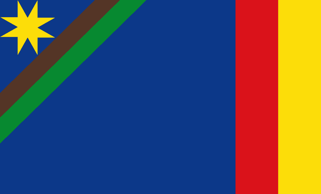 Bandera de la provincia de Bongará y de la ciudad de Jumbilla en Amazonas, Perú